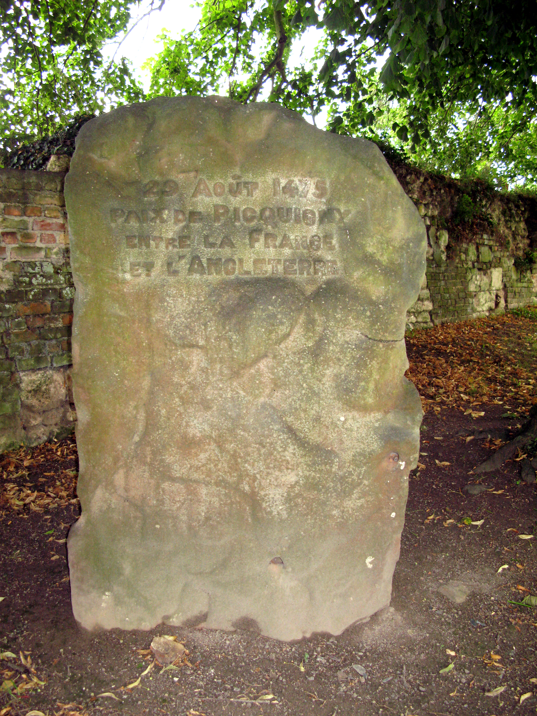 Picquigny (Somme, France) - Stèle commémorant la Paix de Picquigny (1475). Elle est dressée sur le côté de la collégiale, non loin de la descente par l'escalier St-Martin.